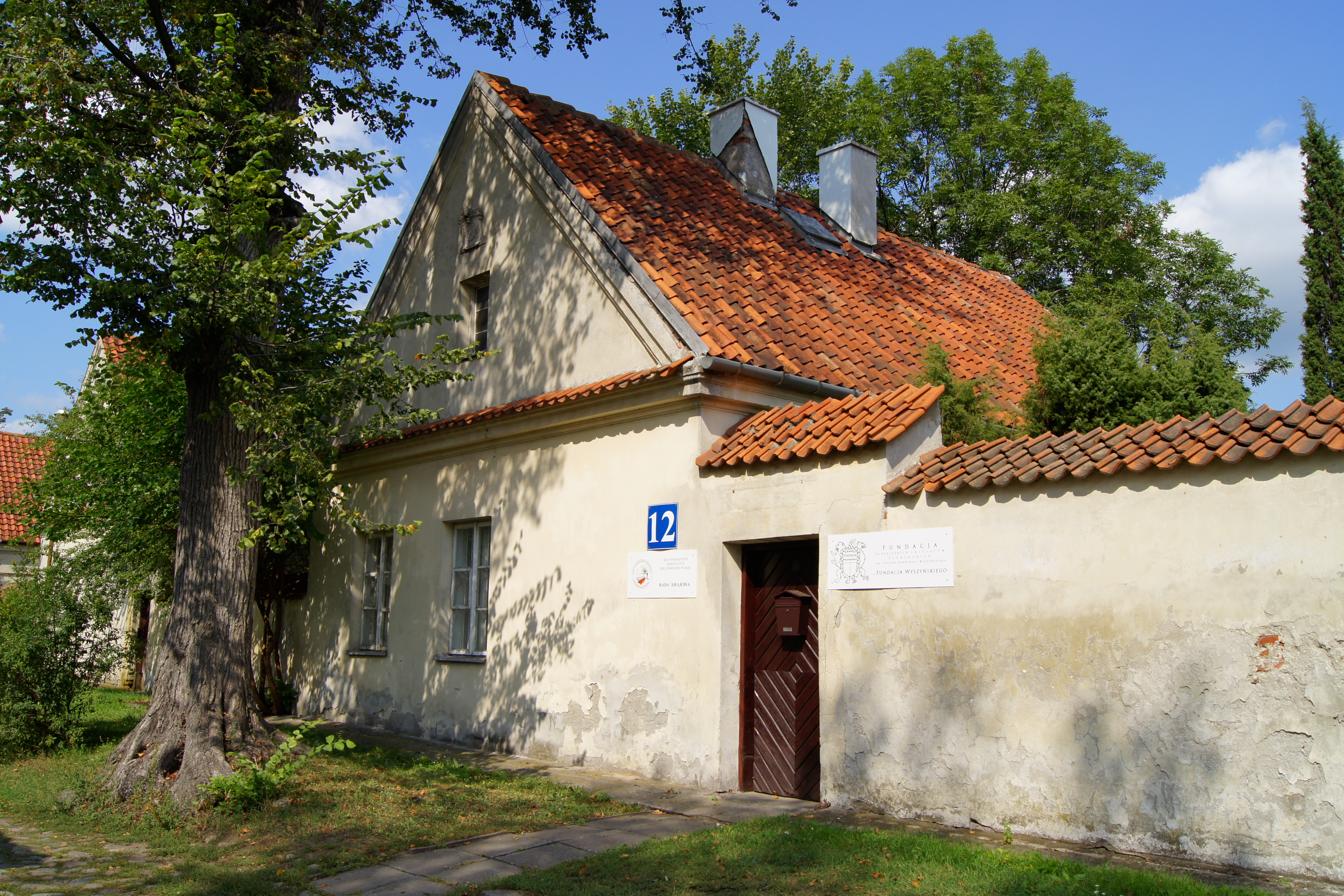 12 erem kamedulski, ul. Dewajtis, Warszawa, dz. Bielany